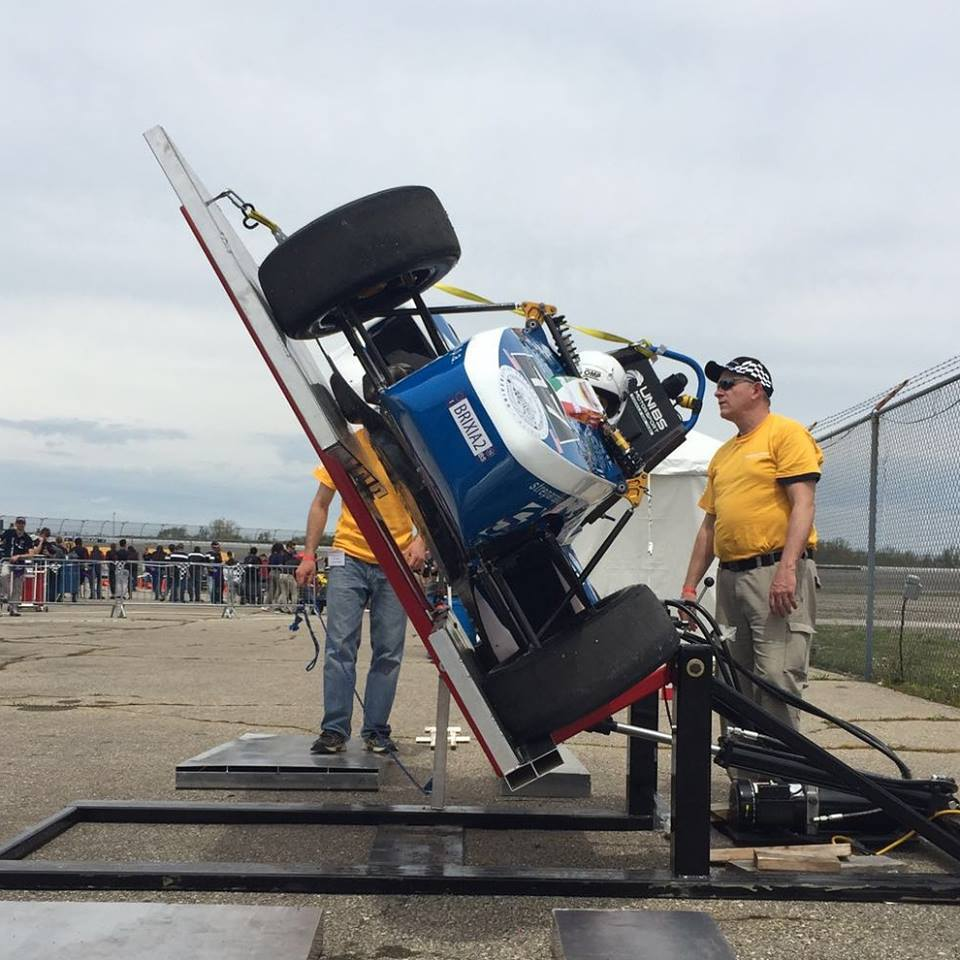 La vettura dell'Università di Brescia durante la prova di Tilt (inclinazione a 60°)